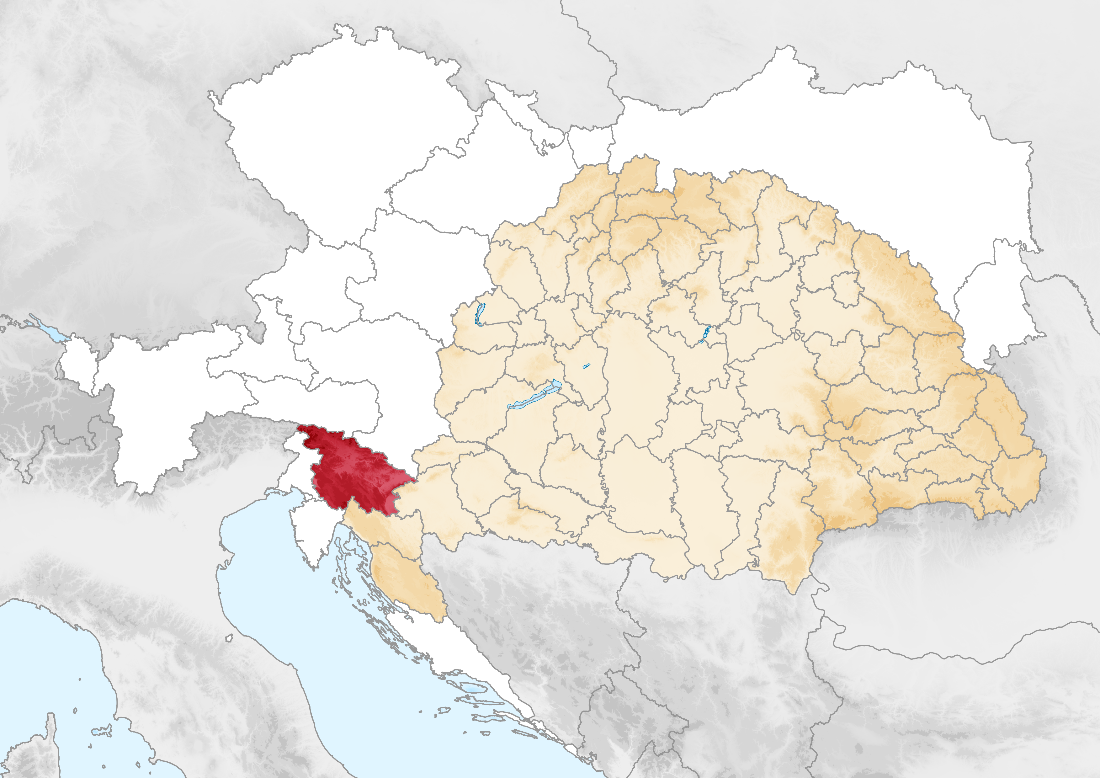 Carte de la Carniole en 1914